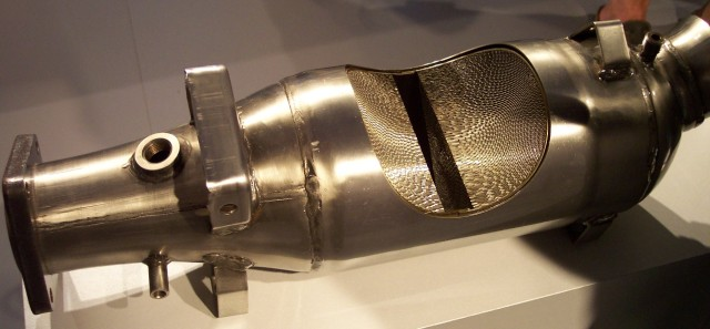 Aufgeschnittener metalkatalysator für ein Kfz, 17:40, 25. Sep 2004 Stahlkocher 640 x 297 (43410 Byte) (Aufgeschnittener metalkatalysator für ein Kfz, Bild-CC-by-sa )